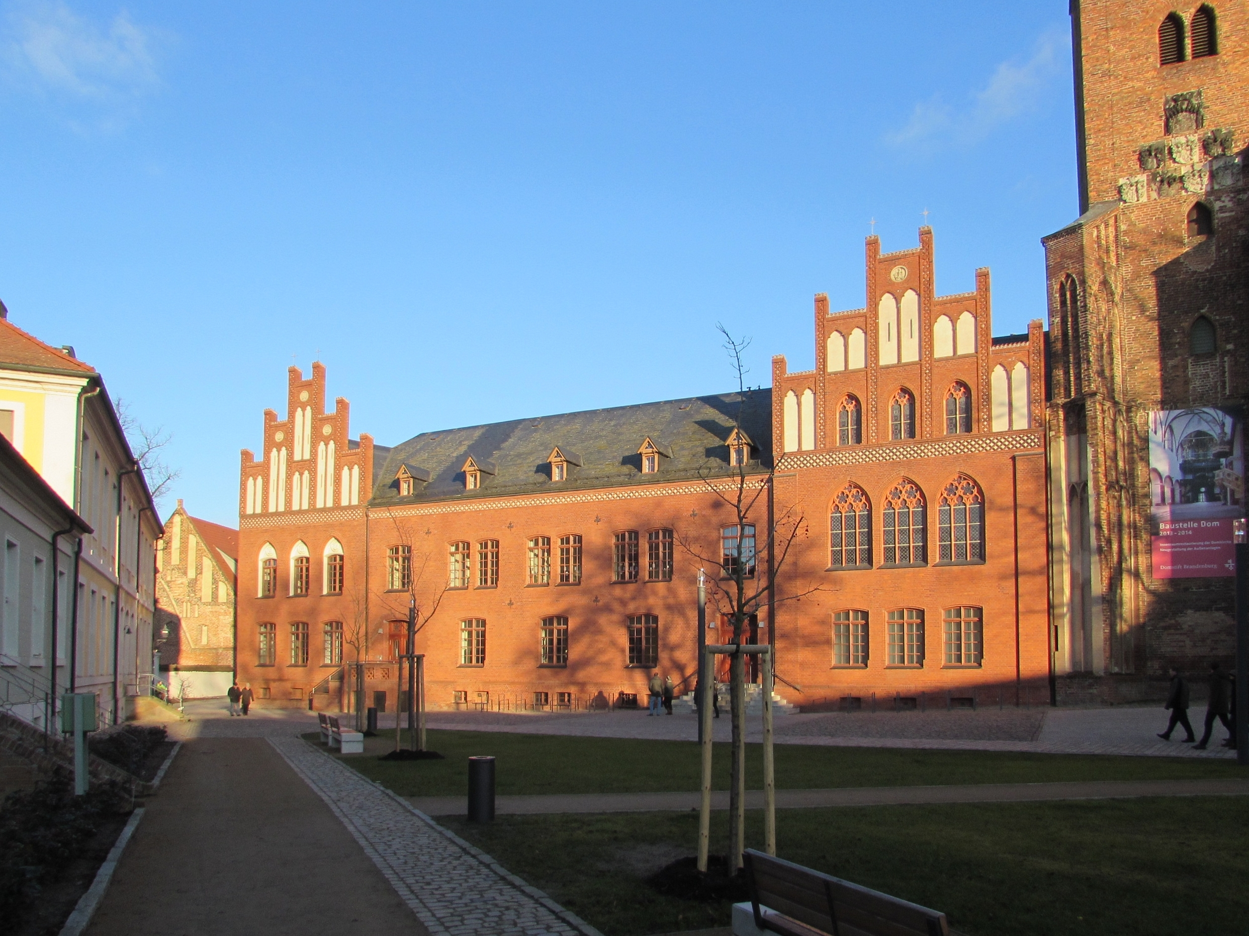 ritterakademie im hof der domburg in brandenburg